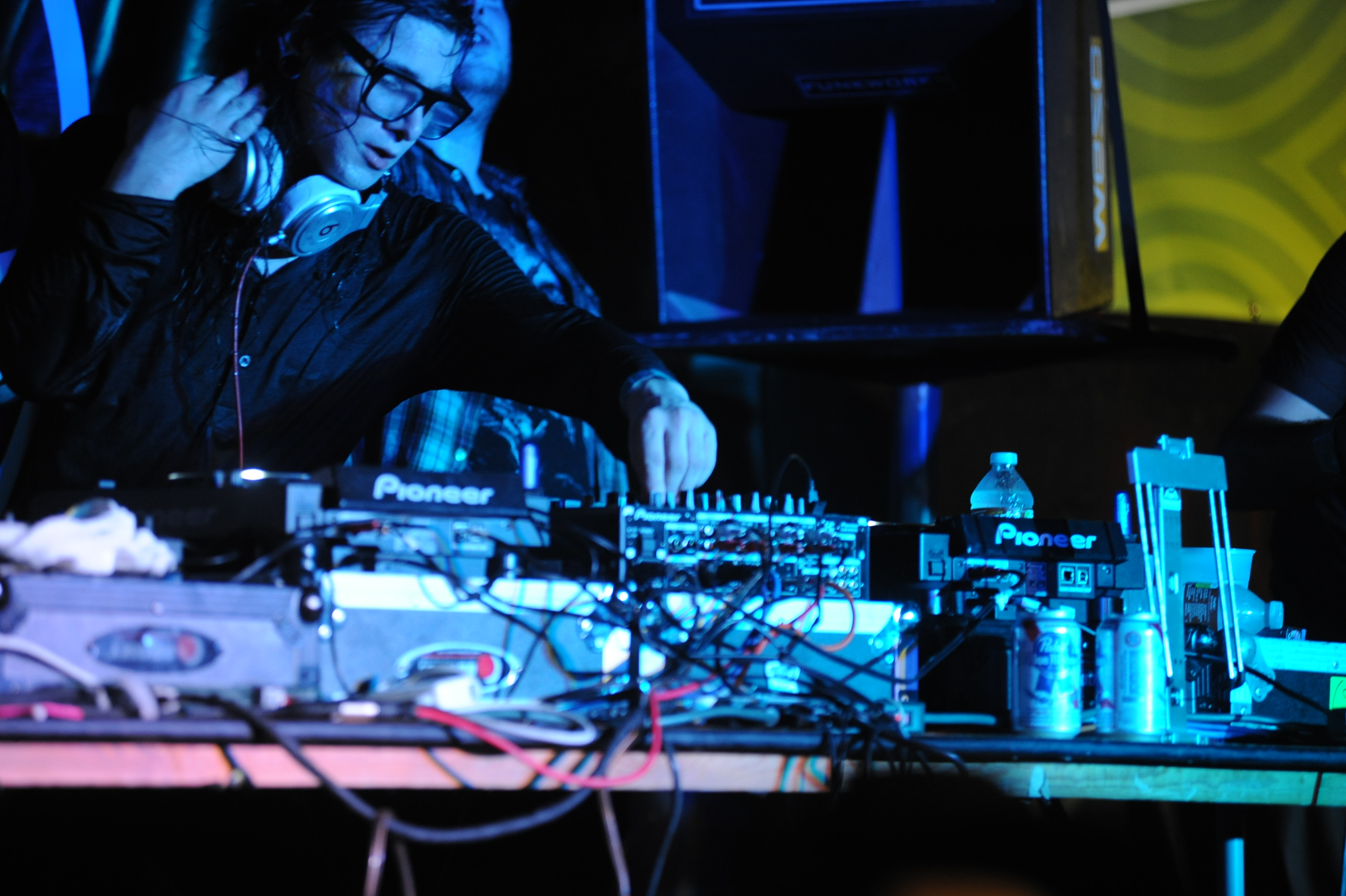 Skrillex